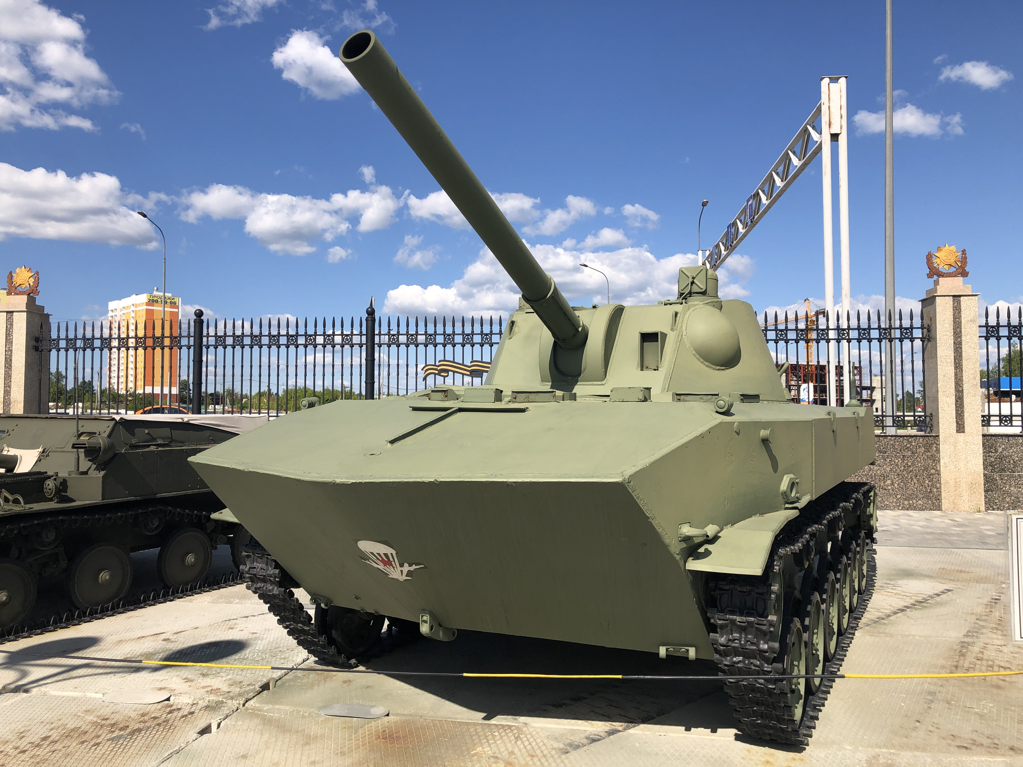 2С9 в Музейном комплексе УГМК, г. Верхняя Пышма, Свердловская область